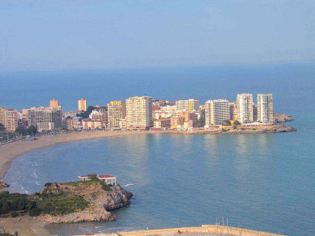 Cap d'Orpesa